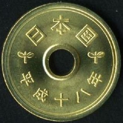 5 Yen Ungültig_Vorderseite